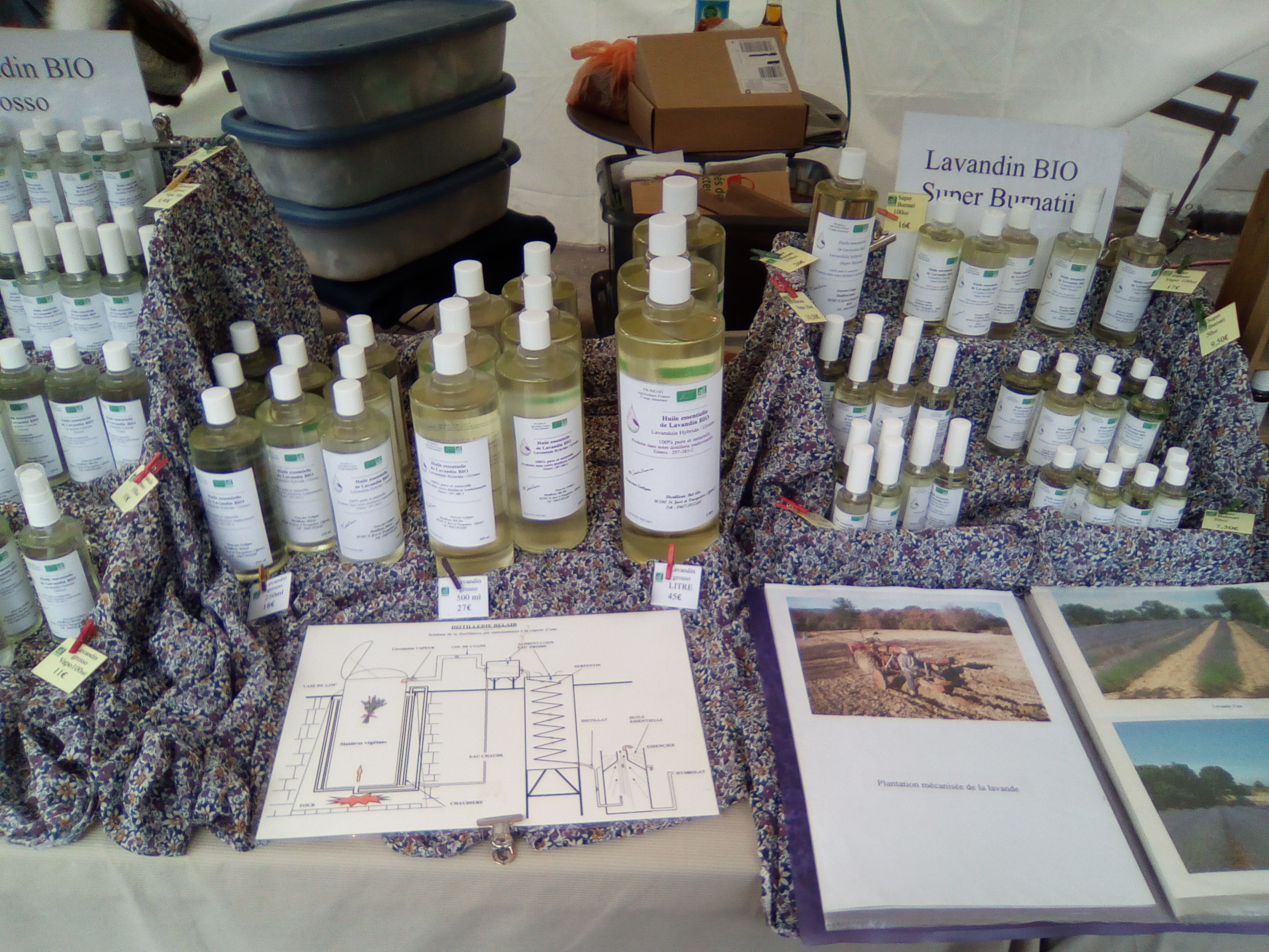 Stand du marché des Producteurs de Pays boulevard de Reuilly